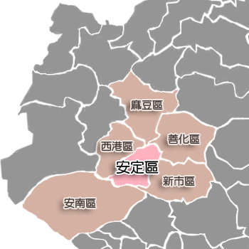 安定區相對位置